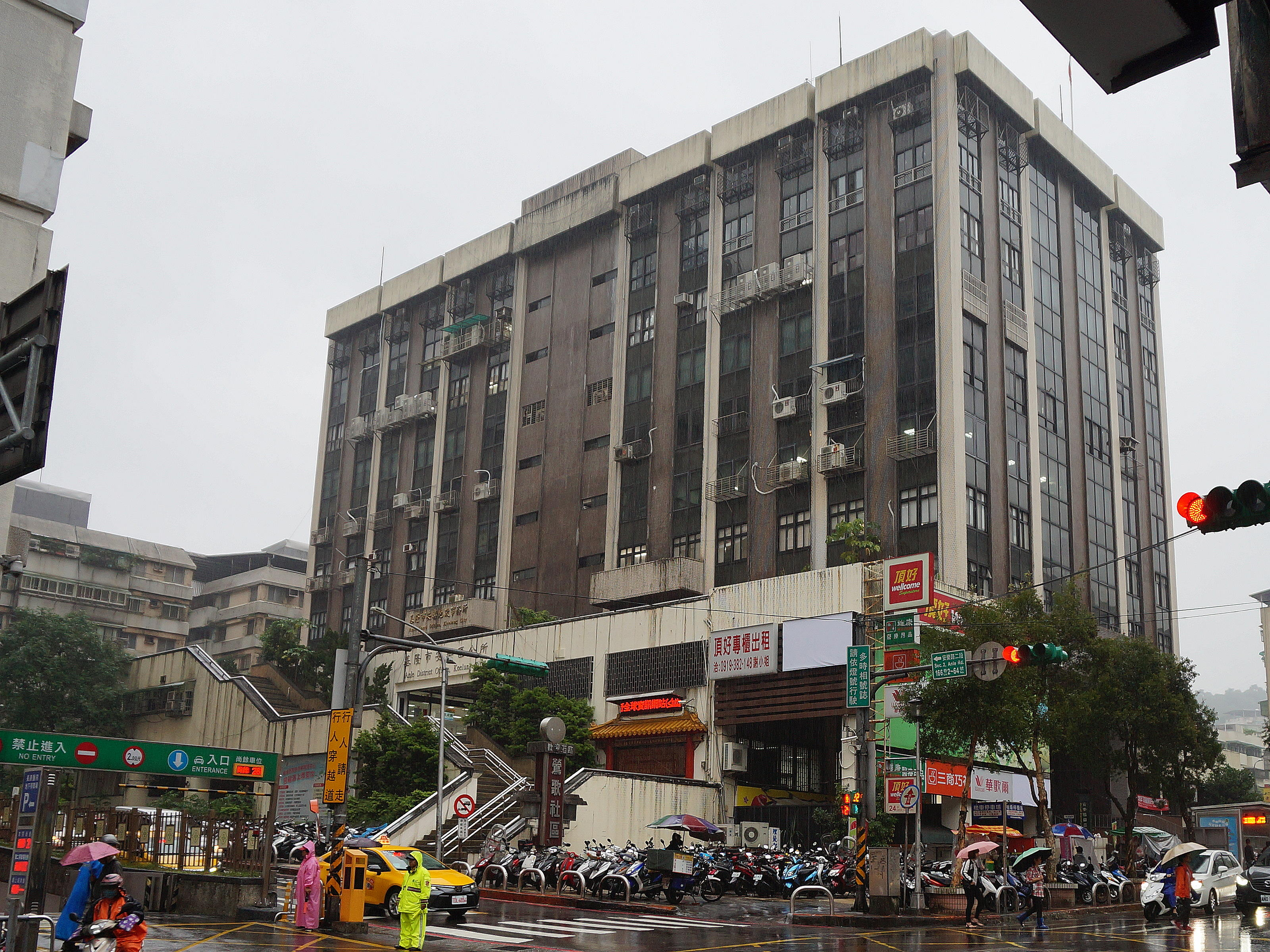 雨中的基隆市安樂區行政大樓。